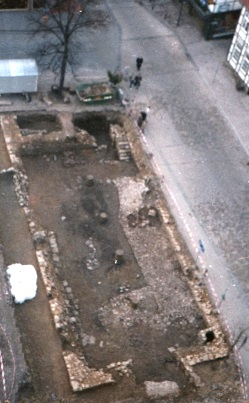 Neustädter Rathaus Warburg - Ausgrabungen im Jahr 1984